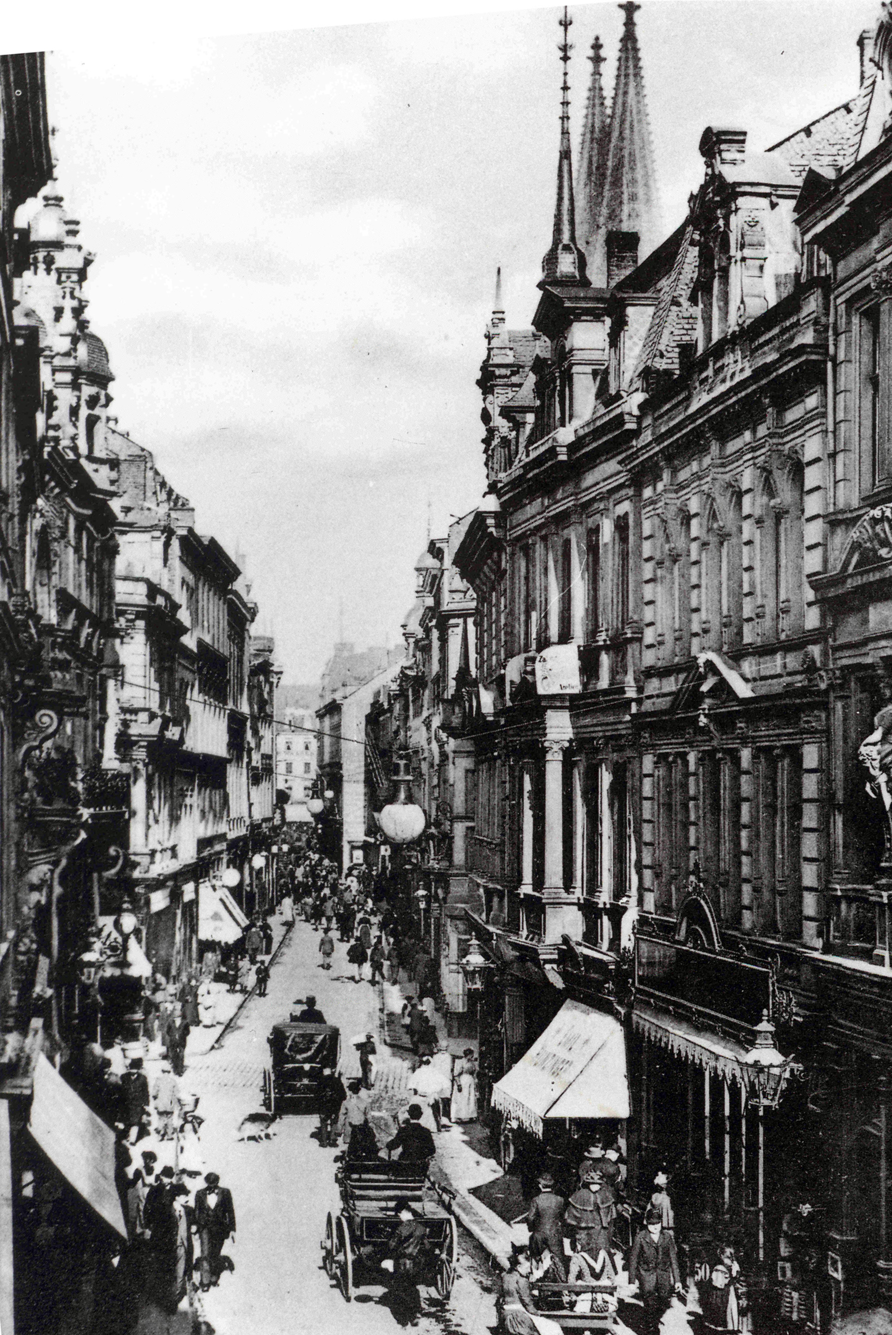 Köln "Hohe Straße", 1895